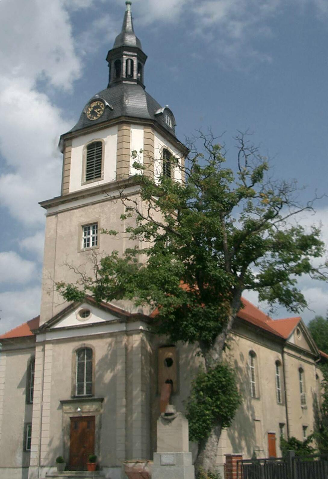 St. Marien in Beetzendorf.